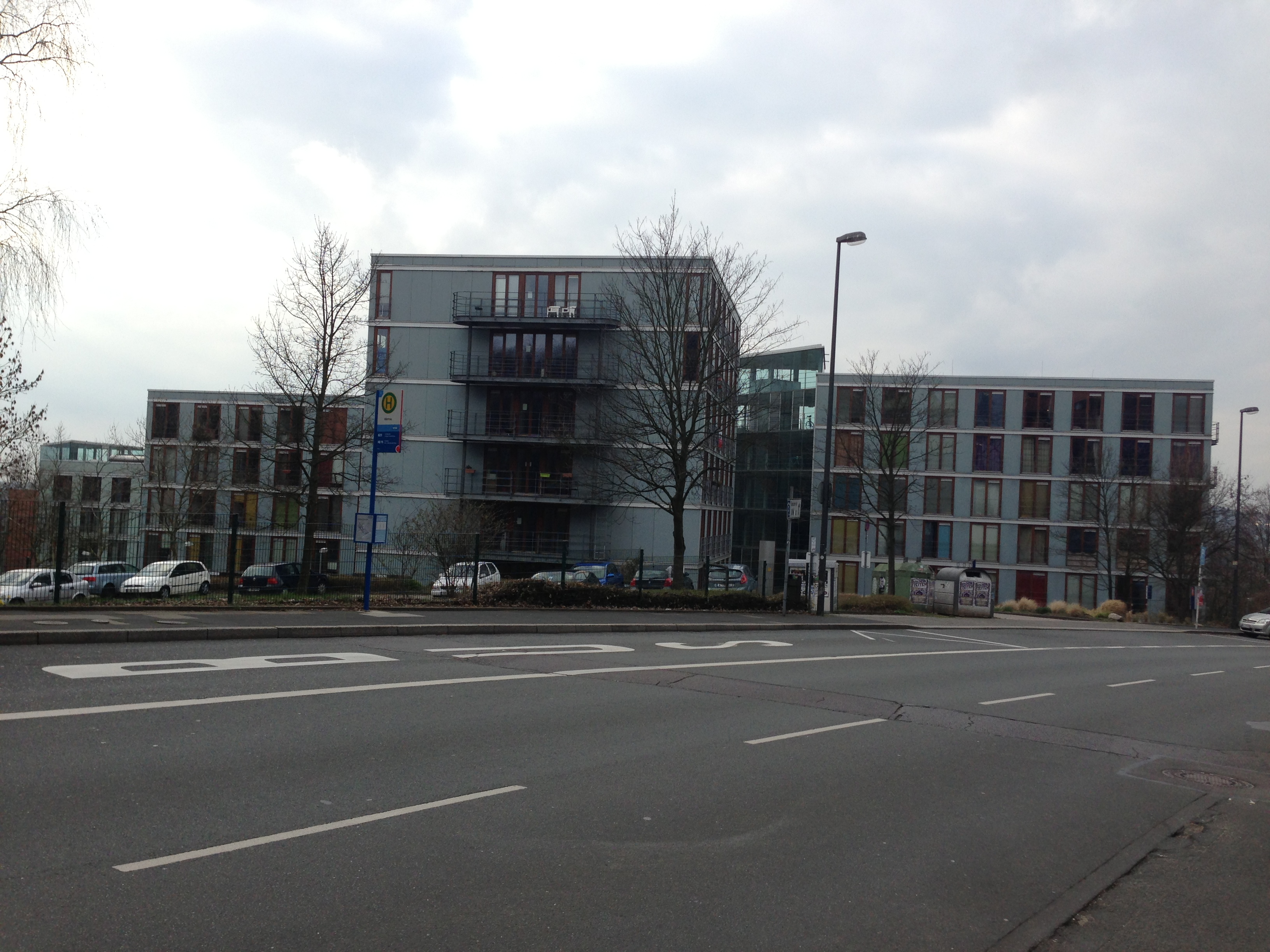 Studentenwohnheime an der Max-Horkheimer-Straße der Bergischen Universität